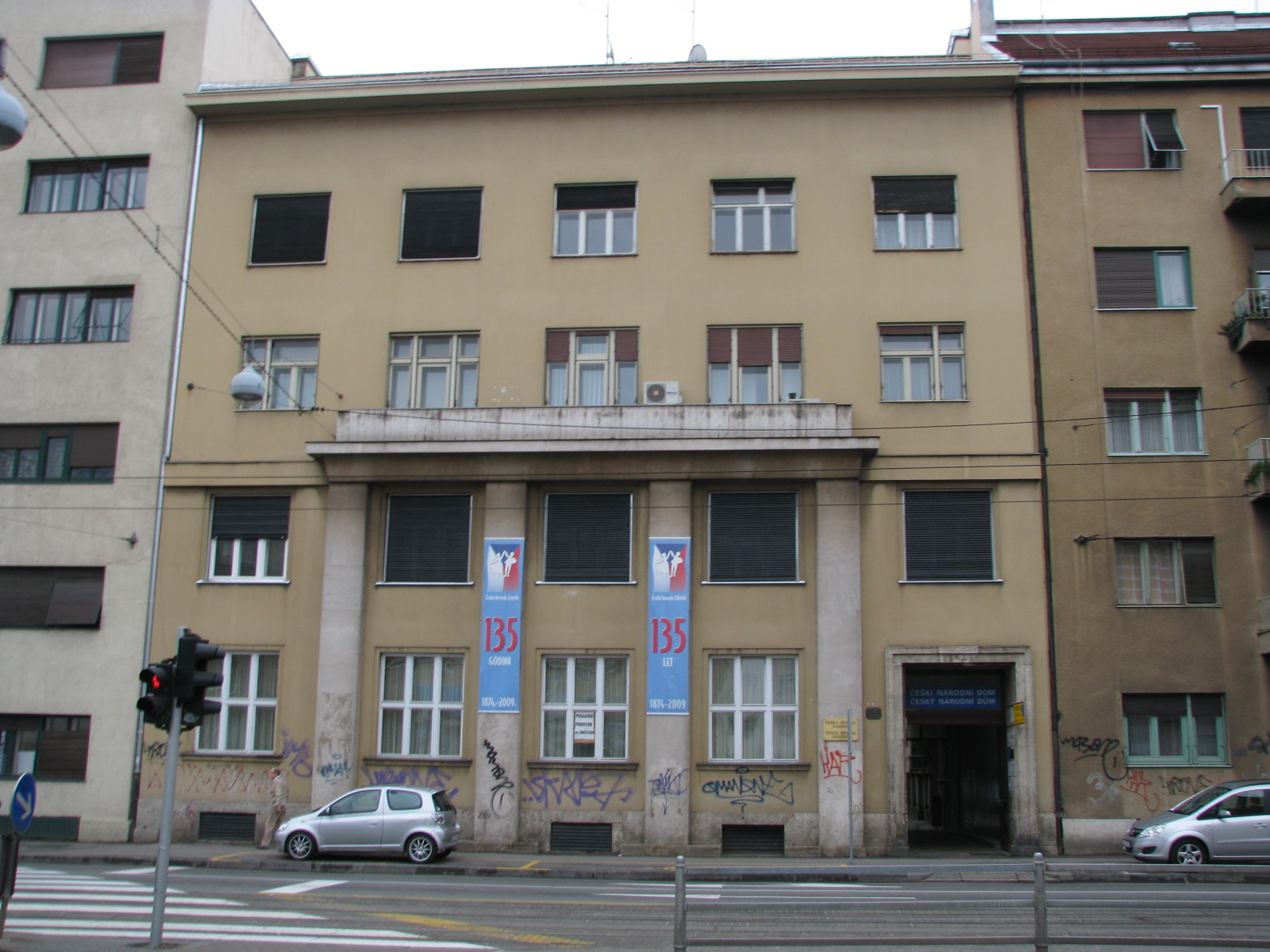 Češka beseda u Zagrebu, Šubićeva ulica